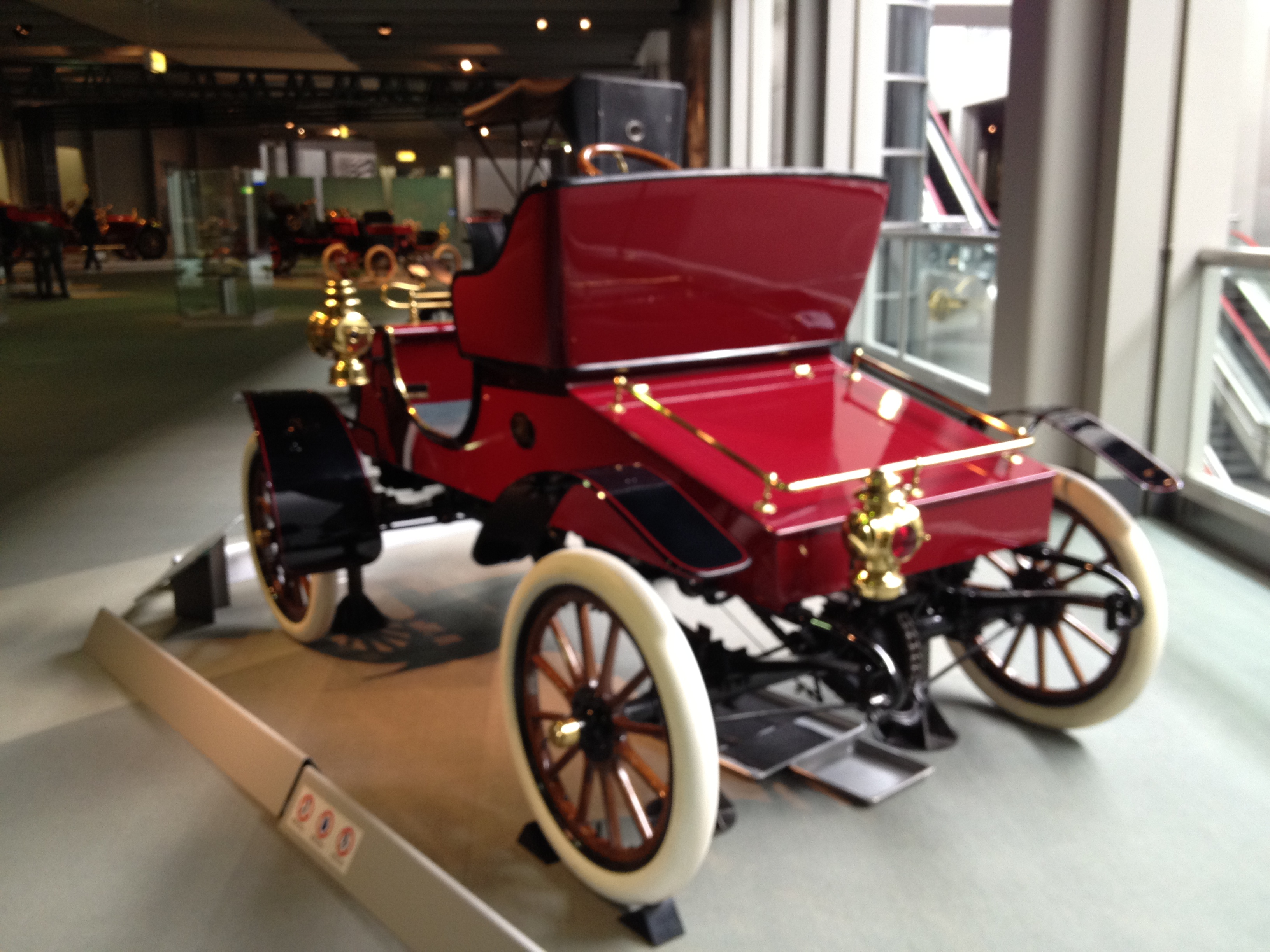 1902 Cadillac Model A Toyota Automobile Museum